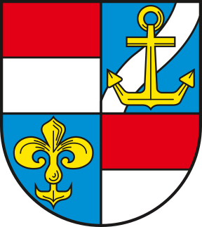 Am 15. Oktober 1990 genehmigtes Wappen des Landkreises Genthin im Bundesland Sachsen-Anhalt